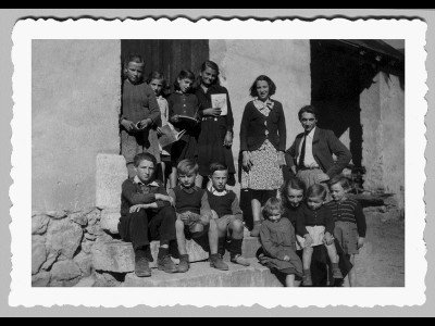 Groupes d'élèves sur le perron de l'école.